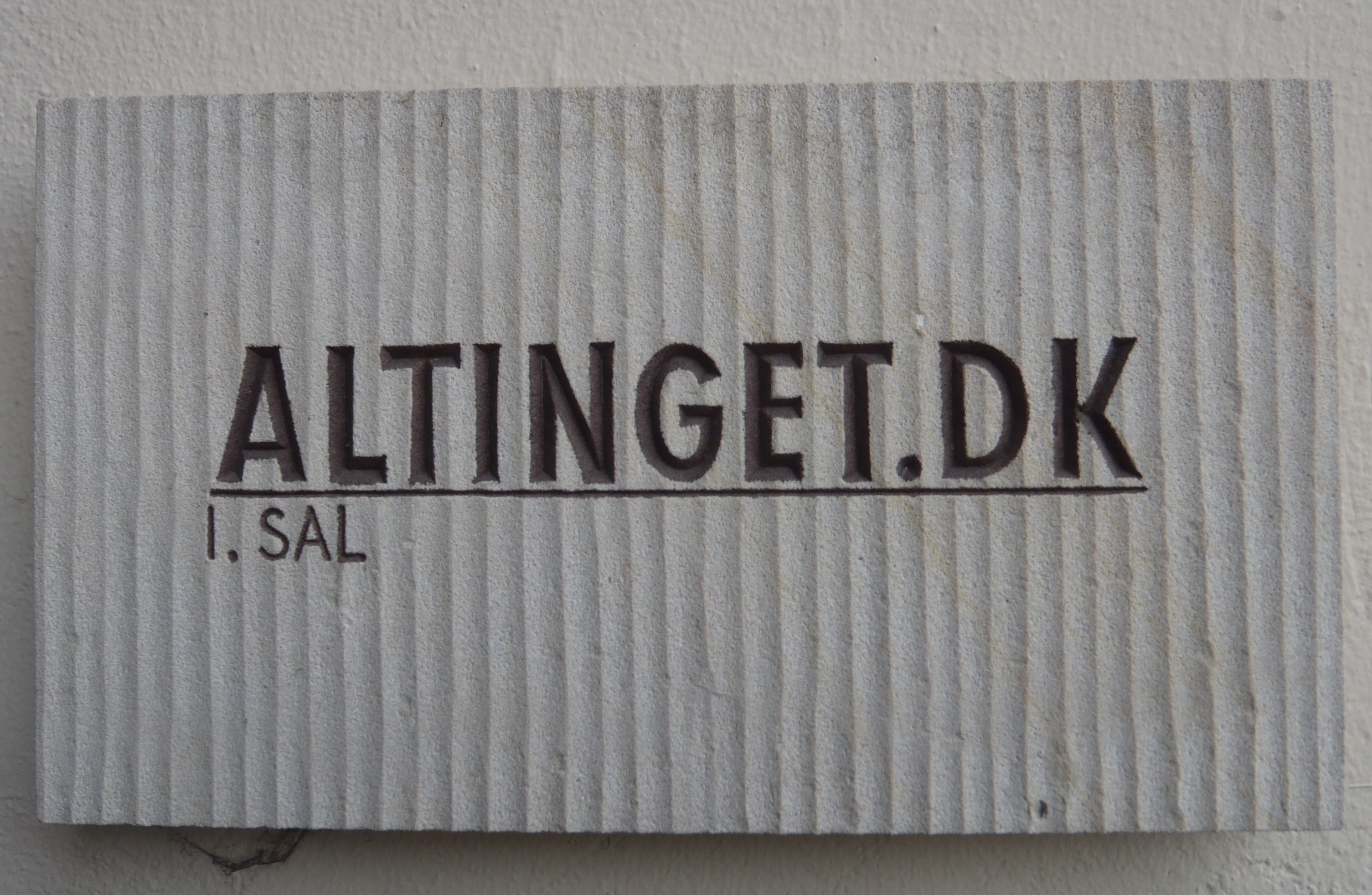 Altinget.dk skilt.